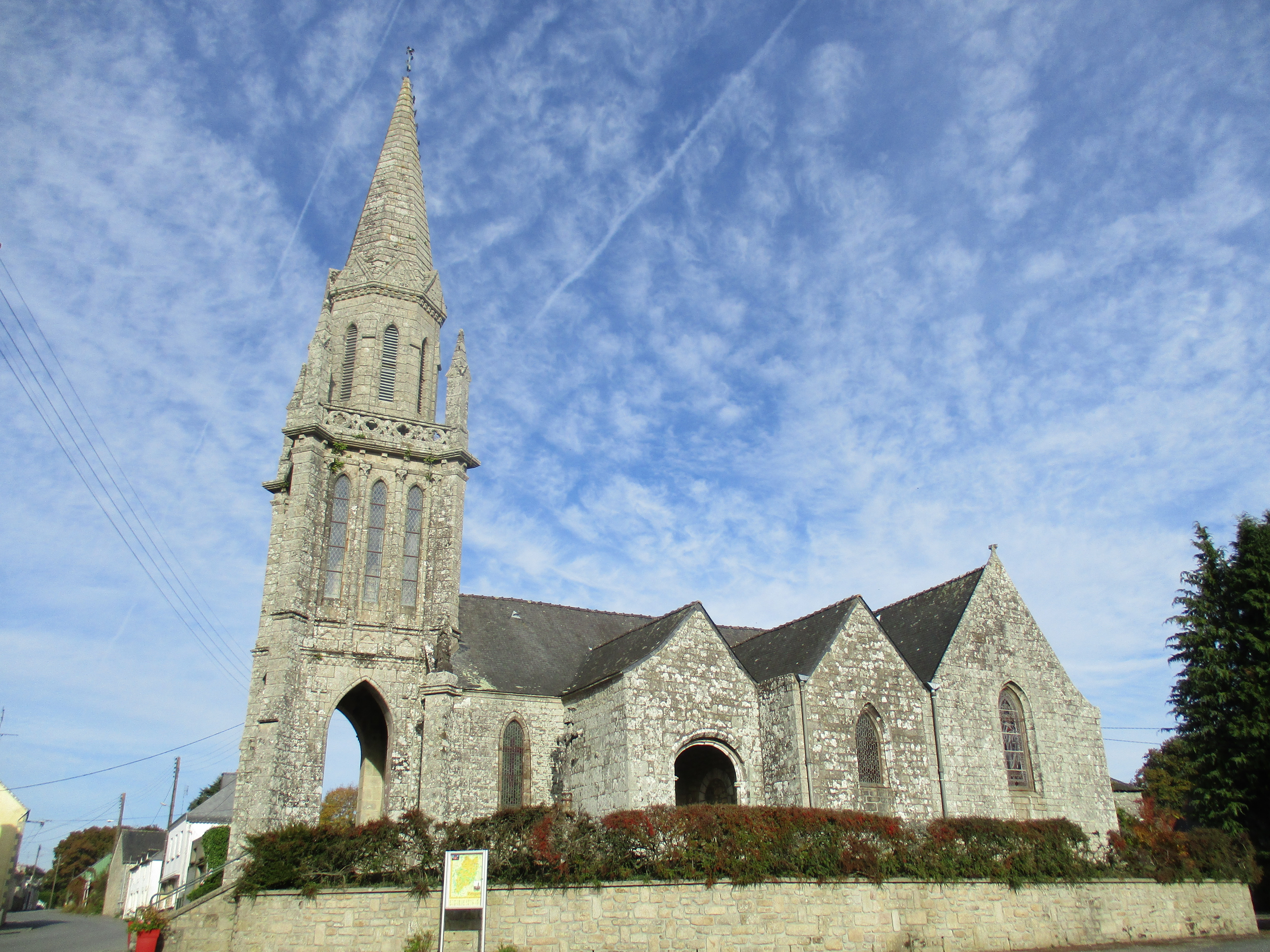 L'église Saint-Adrien de Persquen